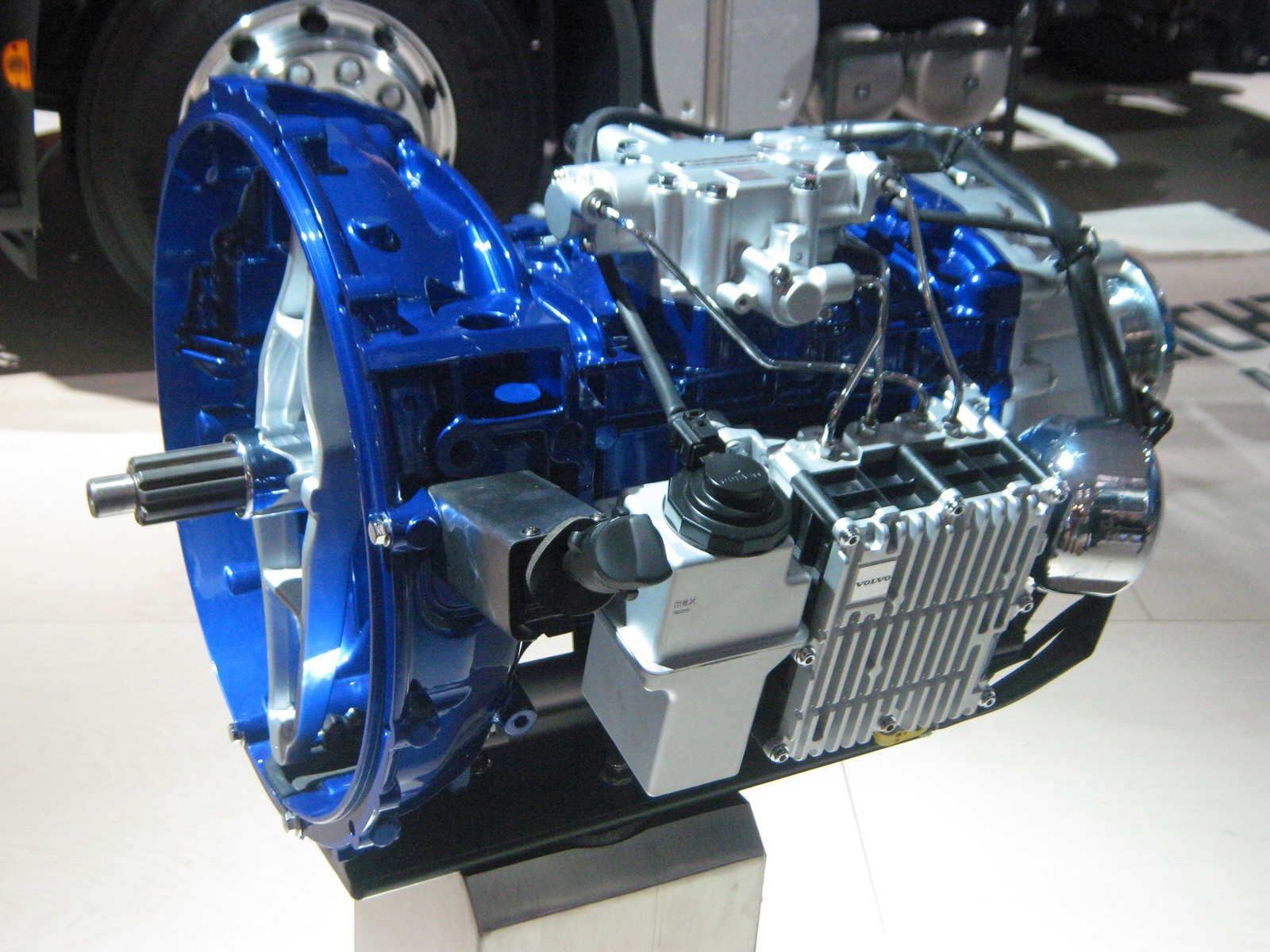 Internationale Automobilausstellung für Nutzfahrzeuge in Hannover 2010